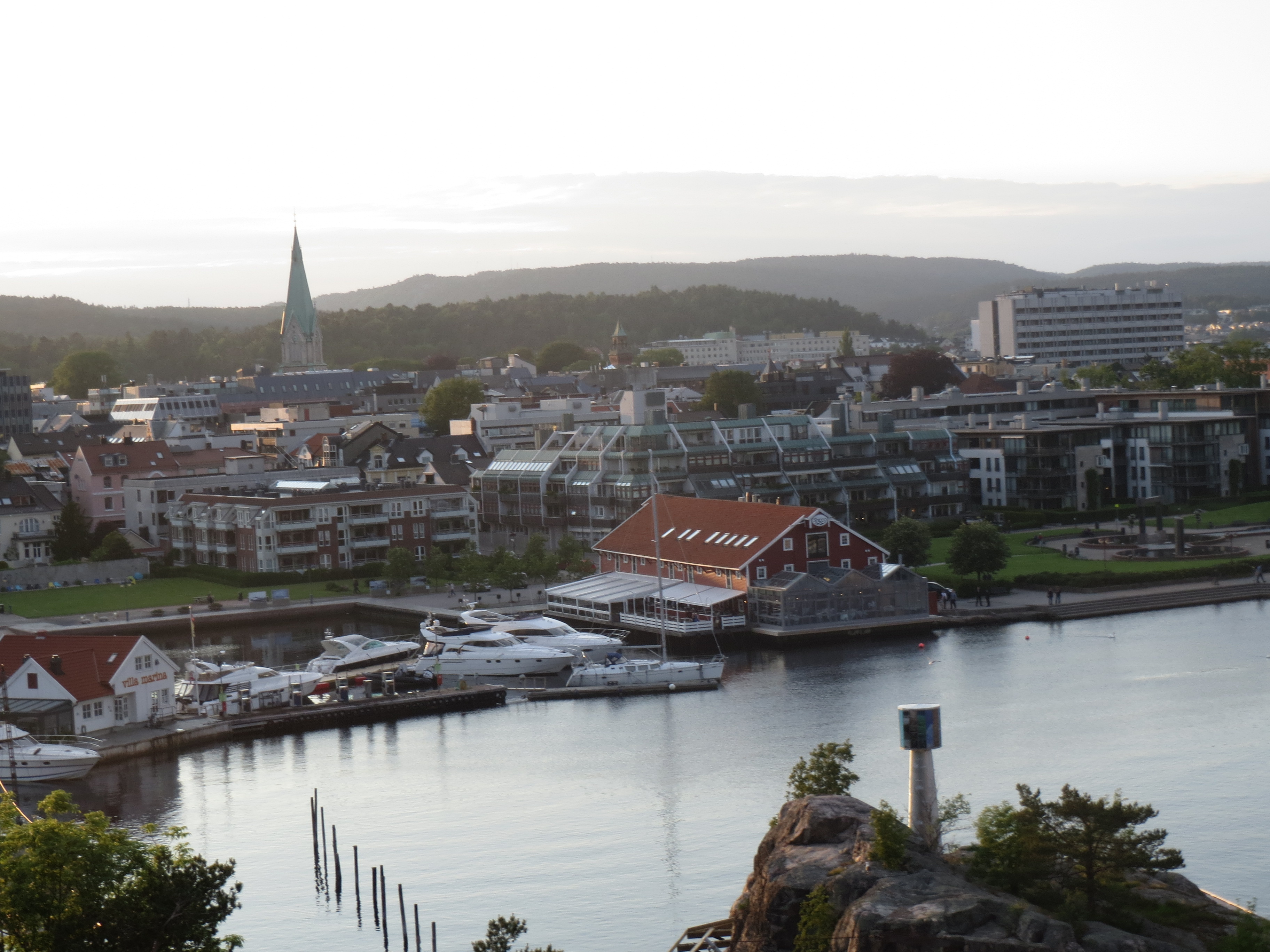 Kvadraturen i Kristiansand, sett fra Odderøya